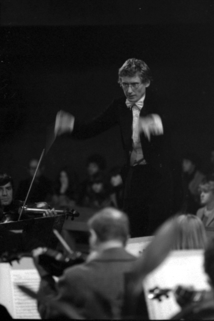 Le chef d’orchestre français Jean-Paul Penin. Orchestre Philharmonique de Strasbourg, novembre 1980.